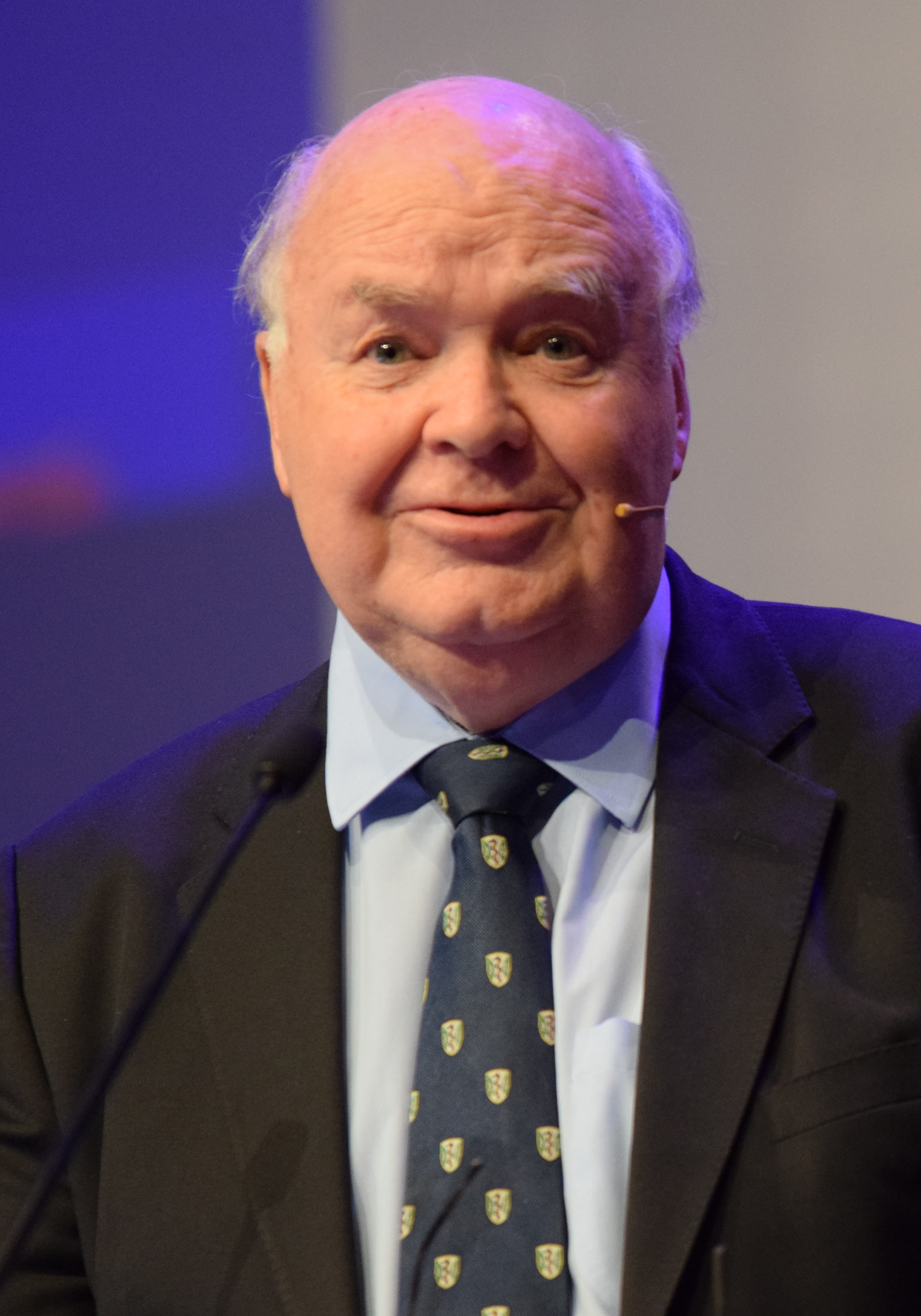 John Lennox